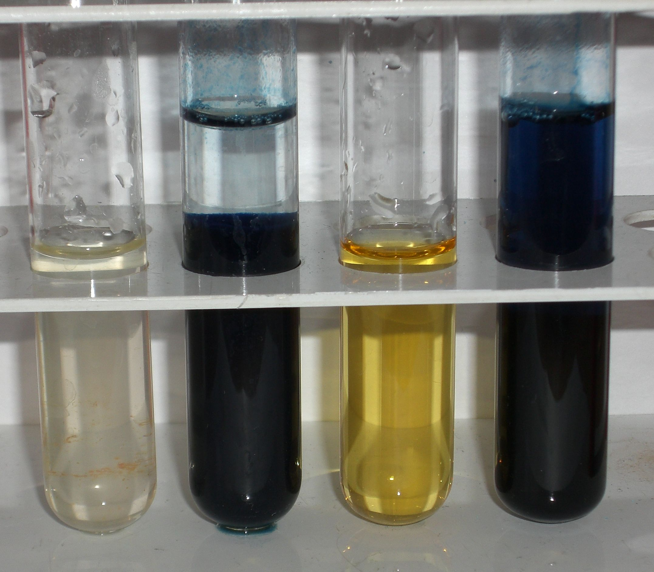 Eisen(II) und Eisen(III) Salze mit Blutlaugensalz zu Berliner Blau